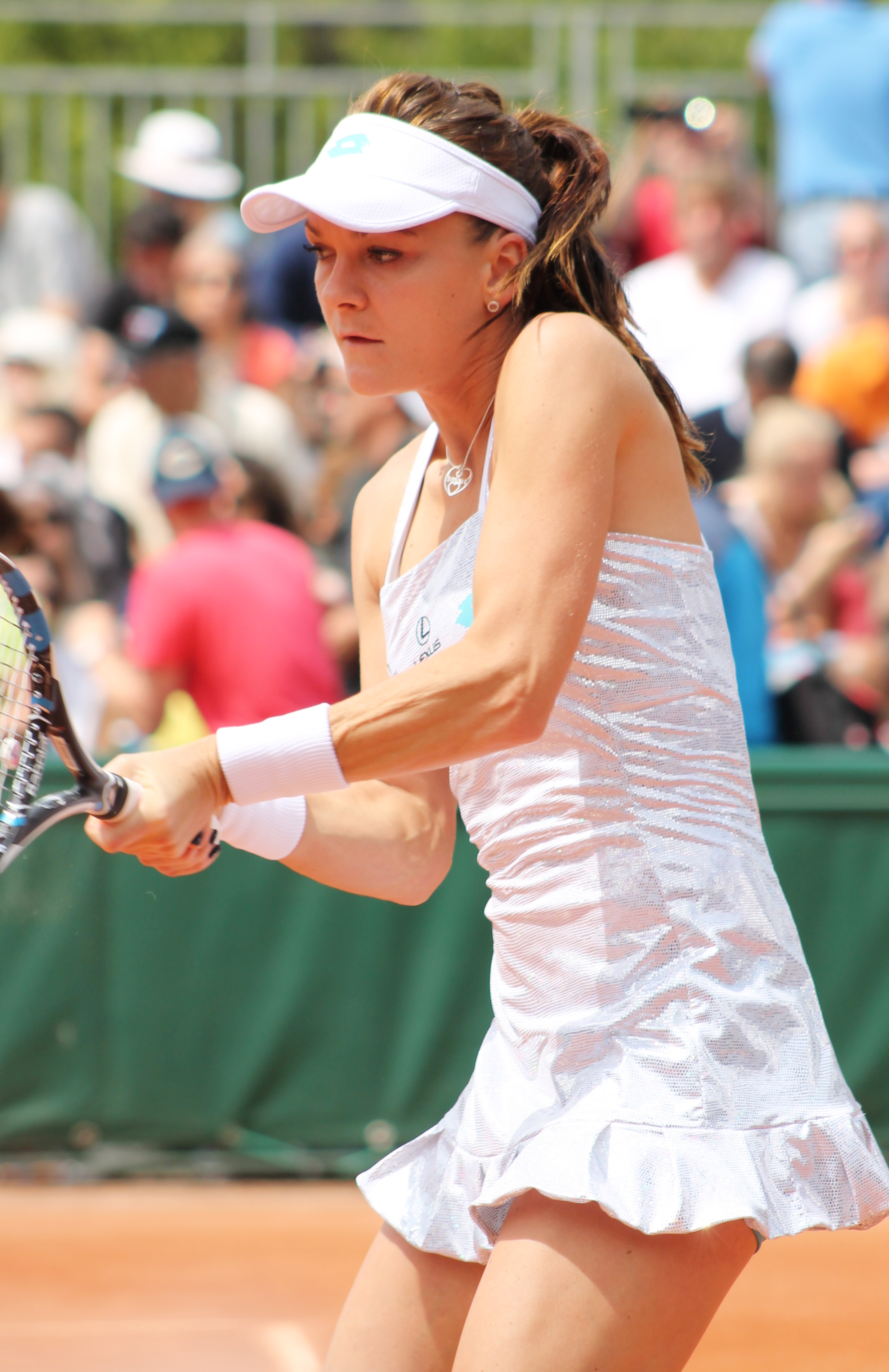 Radwanska A. RG15 (9)